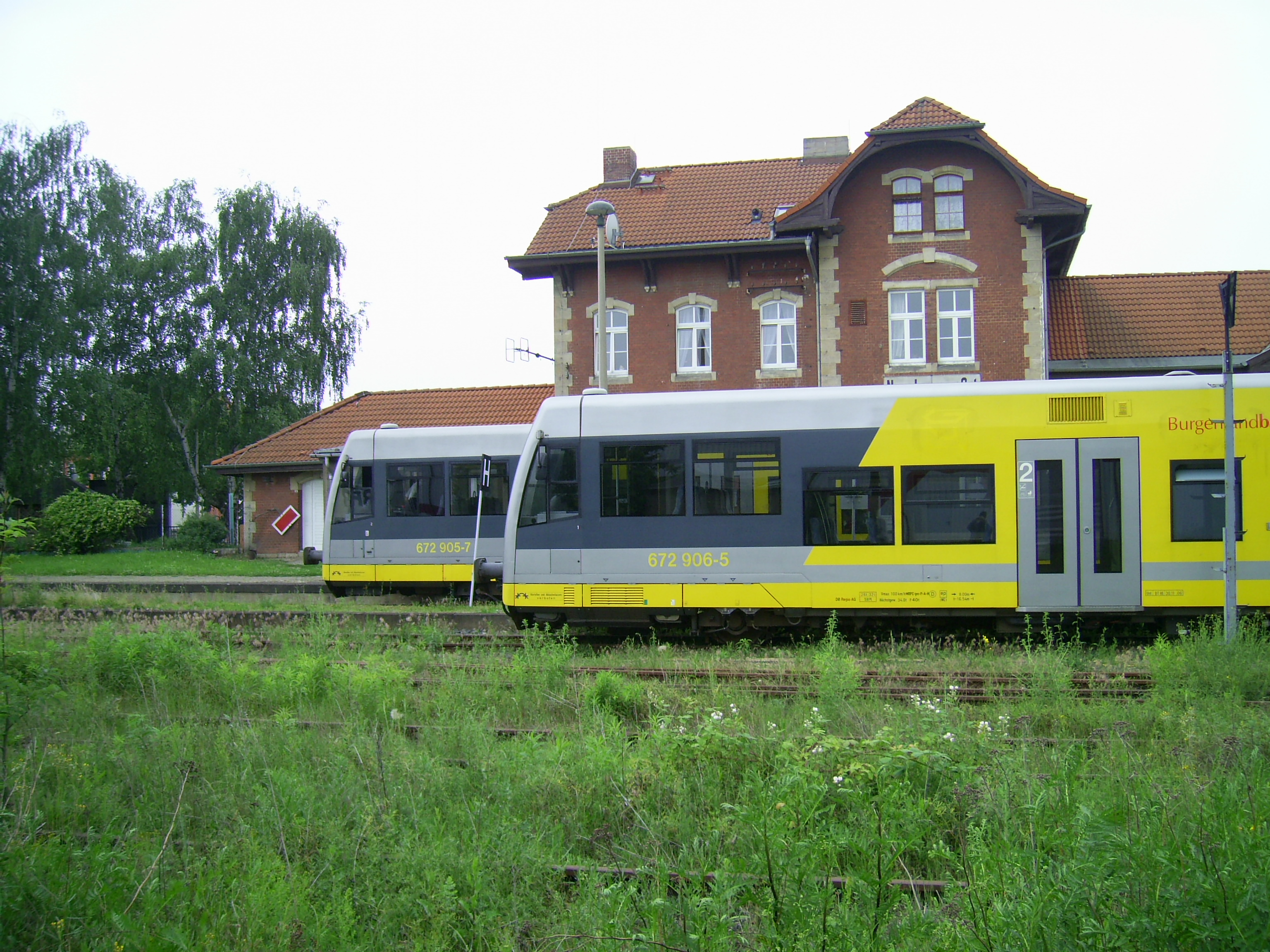 Fahrzeuge der Baureihe 672 der Burgenlandbahn GmbH im Ostbahnhof von Naumburg (Saale)